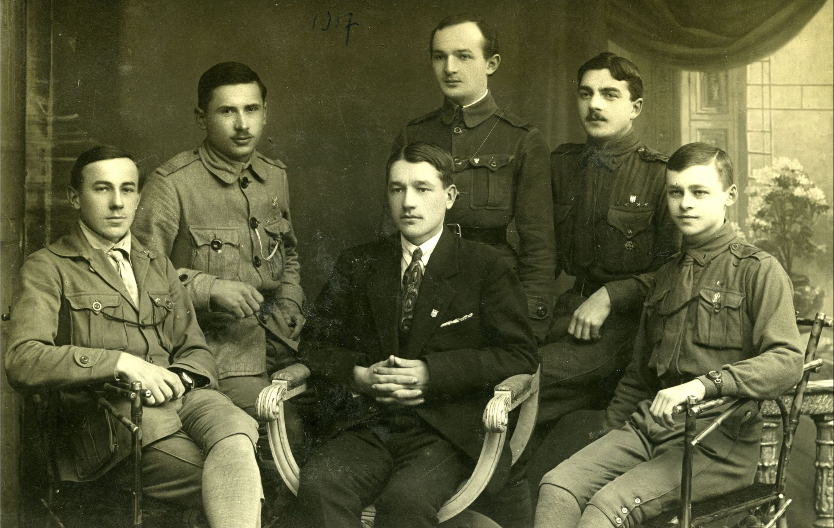 Pierwszy z prawej siedzi Witold Pilecki. Pierwszy z lewej siedzi Witold Ferchmin